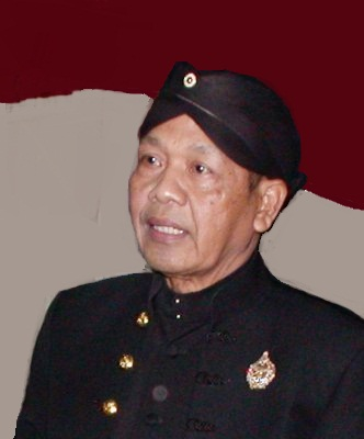 Begug Poernomosidi